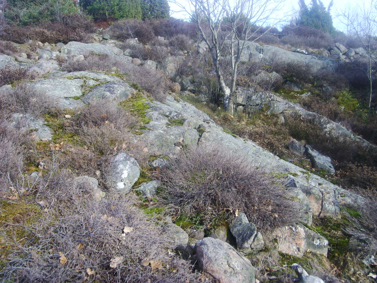 Fornborgen Askim 2:1 i Göteborgs kommun.